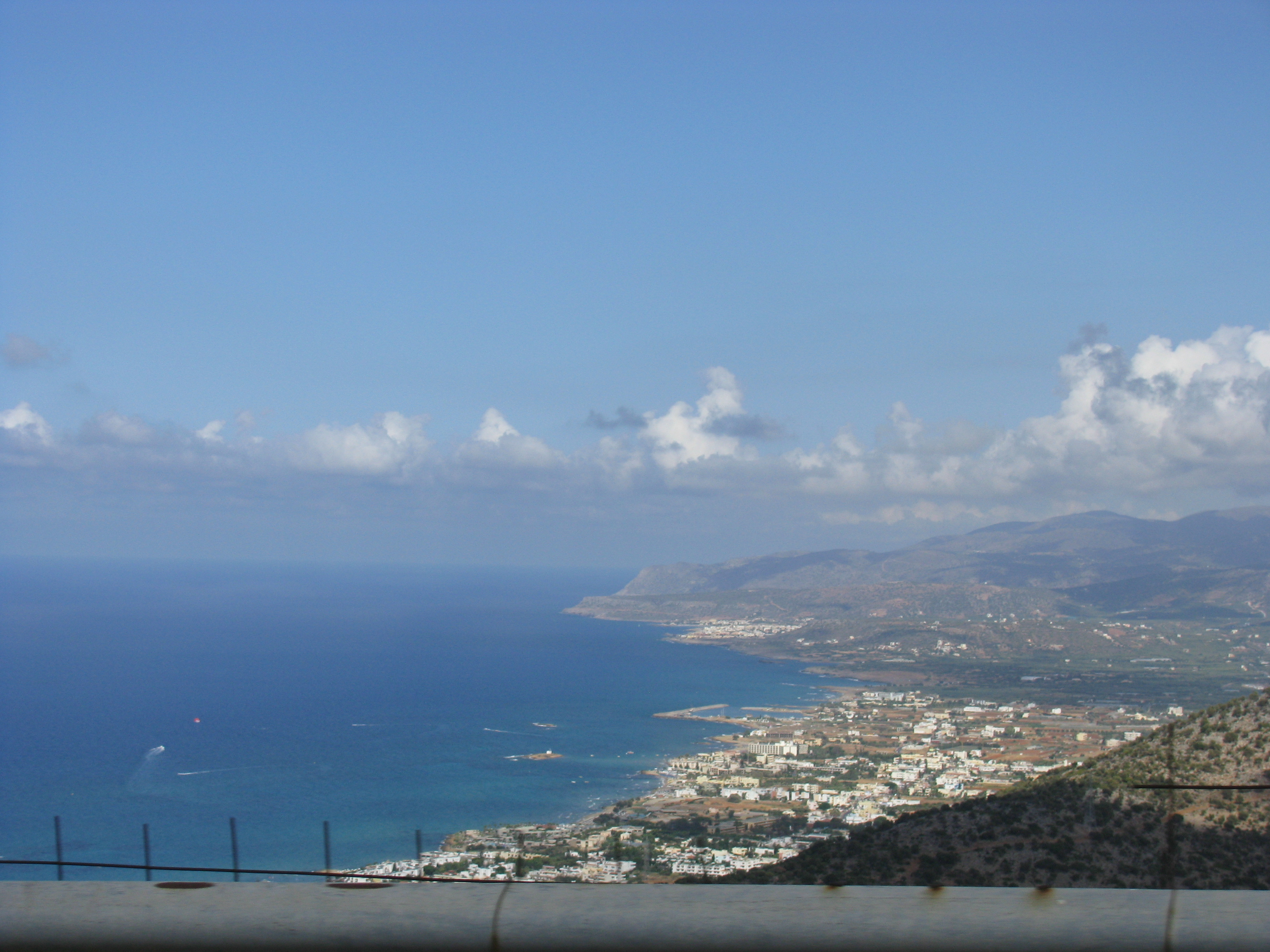 Вид на Малью, Крит